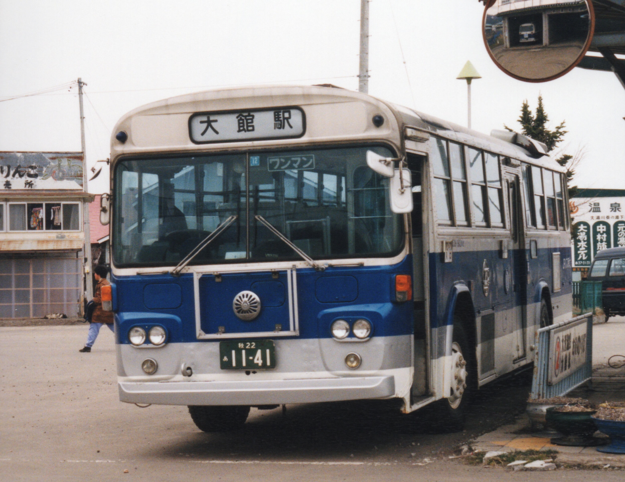 十和田南線 大館駅行き 538-1902 十和田南駅にて